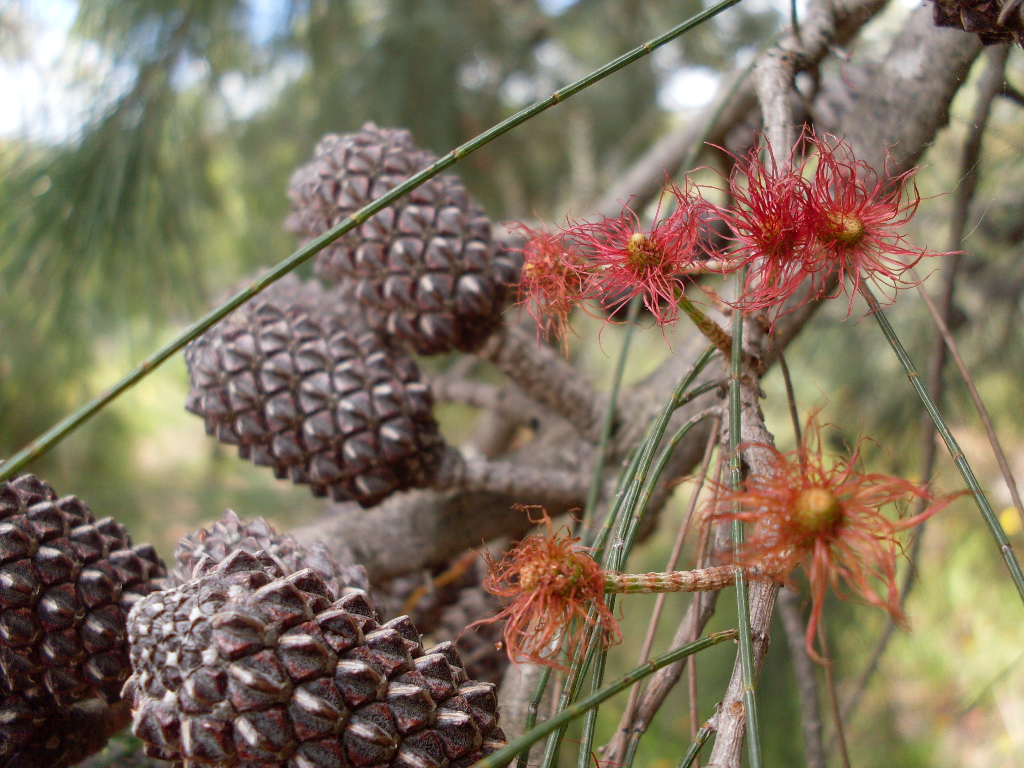 Allocasuarina distyla. Jannali, NSW, Australia, December 2008.